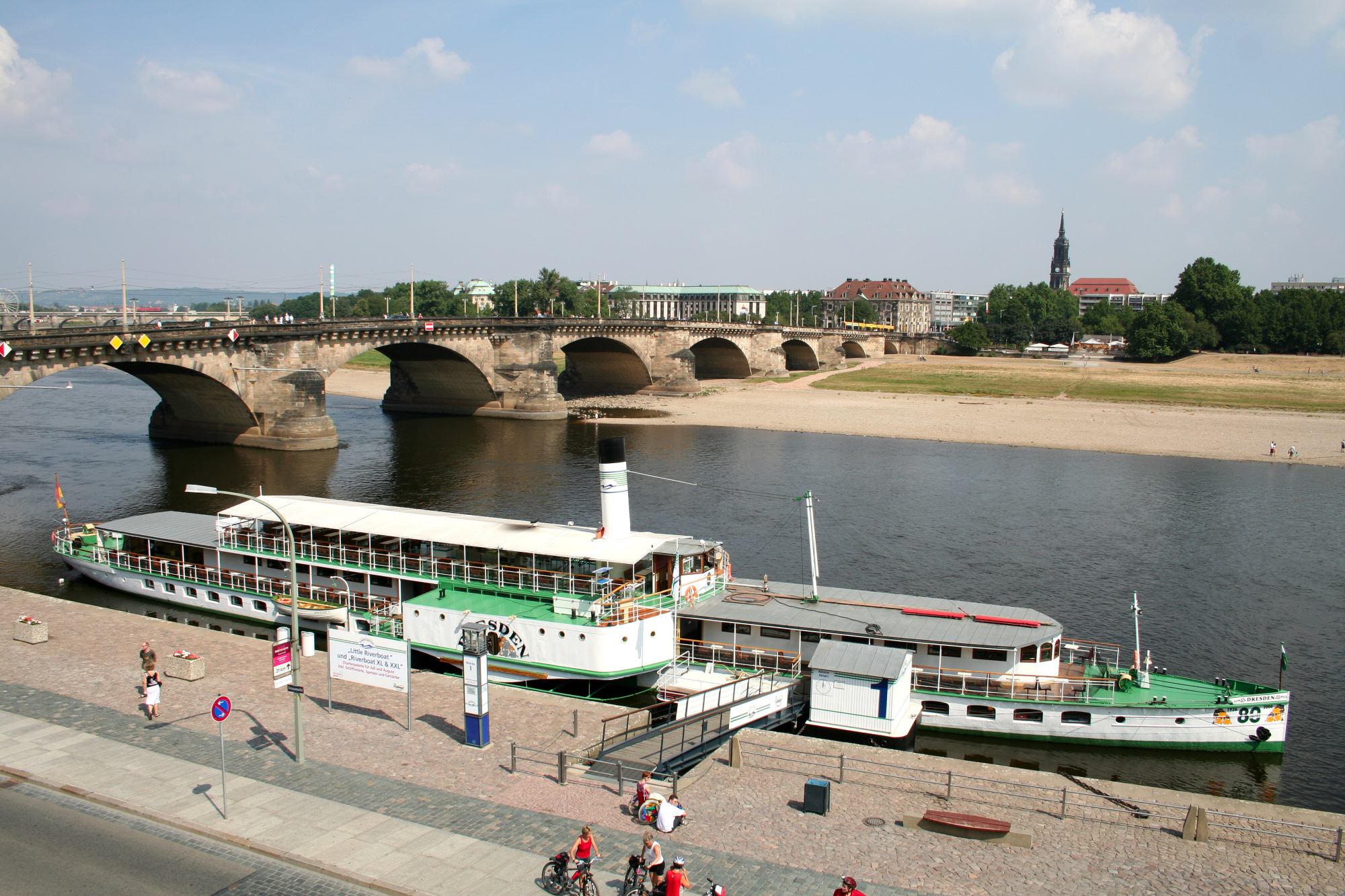 Elbe, Dresden, Germany